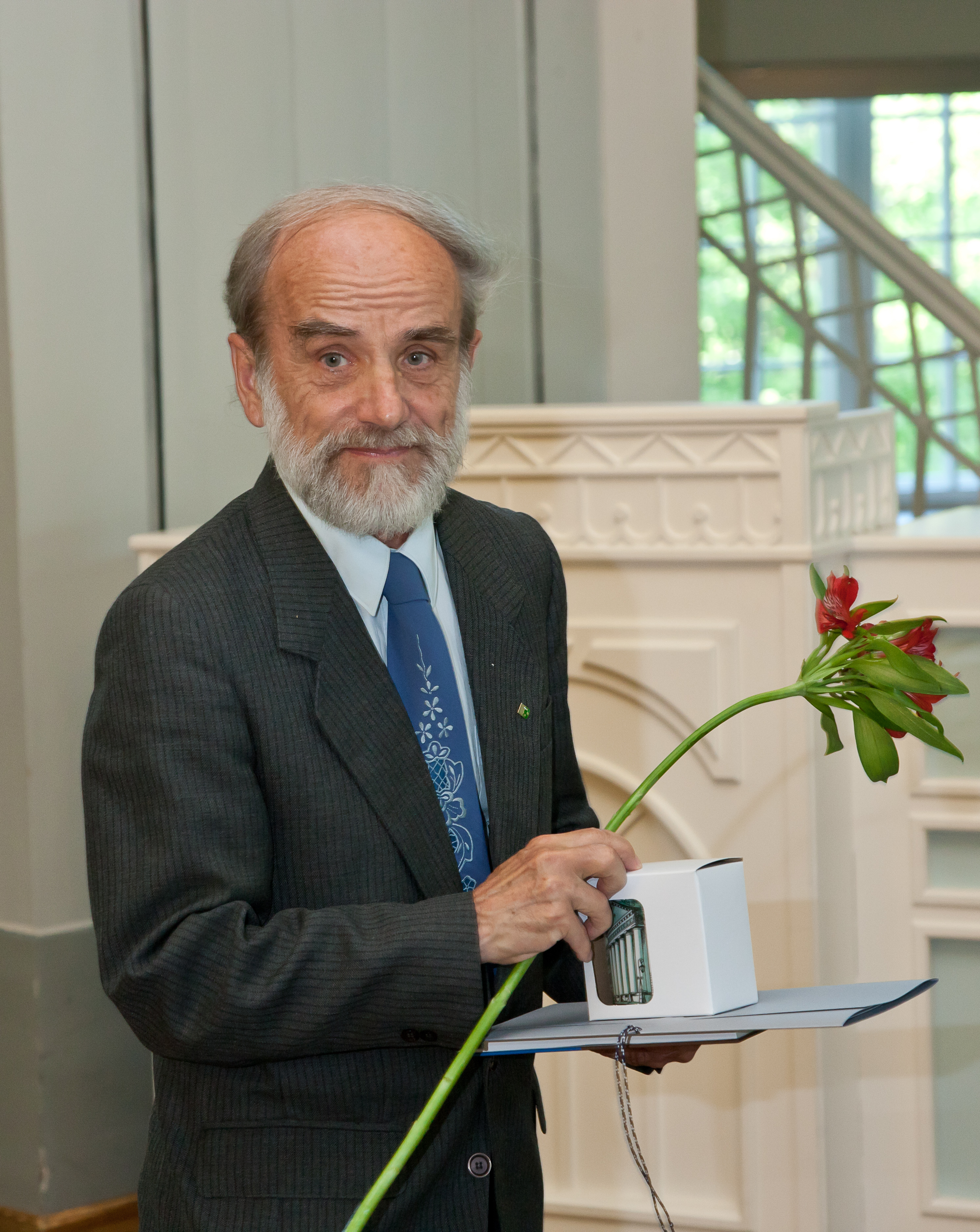 Tartu Ülikooli rektori Alar Karise vastuvõtt ülikooli pensioneerunud töötajatele 6. juunil 2011 Tartu Ülikooli ajaloo muuseumis. Pildil ökoloogia ja maateaduste instituudi geograafia osakonna teadur, emeriitprofessor Ott Kurs.